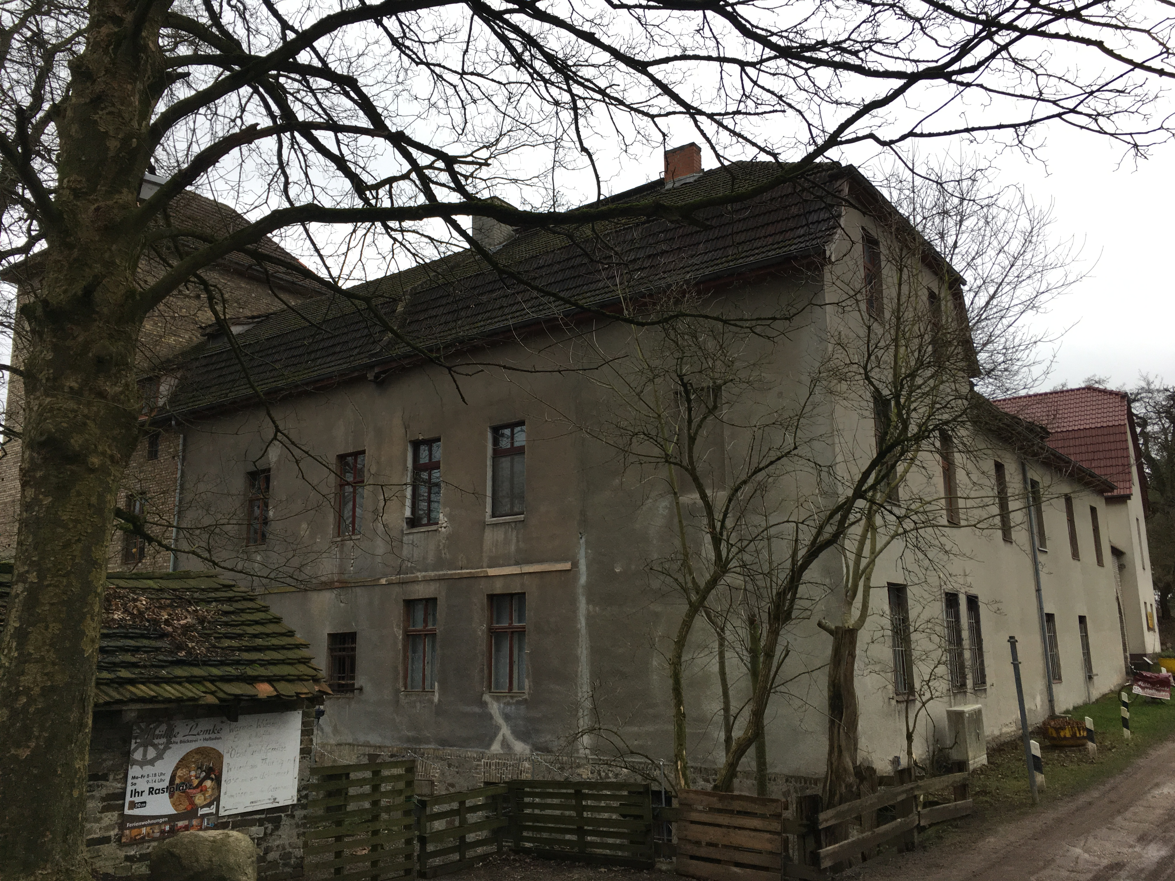 Die Mühle in Hennickendorf entstand im Jahr 1798 als Walkmühle. Sie steht in Rüdersdorf bei Berlin in Brandenburg.